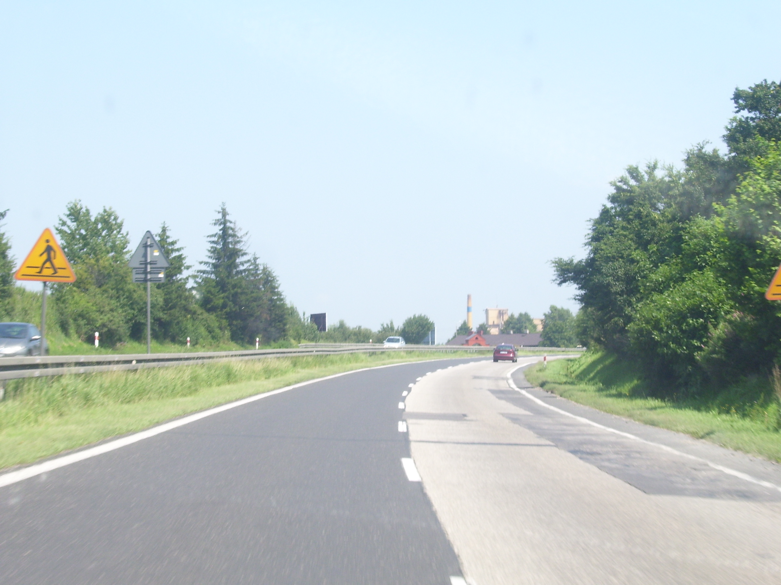 DK8 (Poland) Droga krajowa nr 8 w Mszczonowie